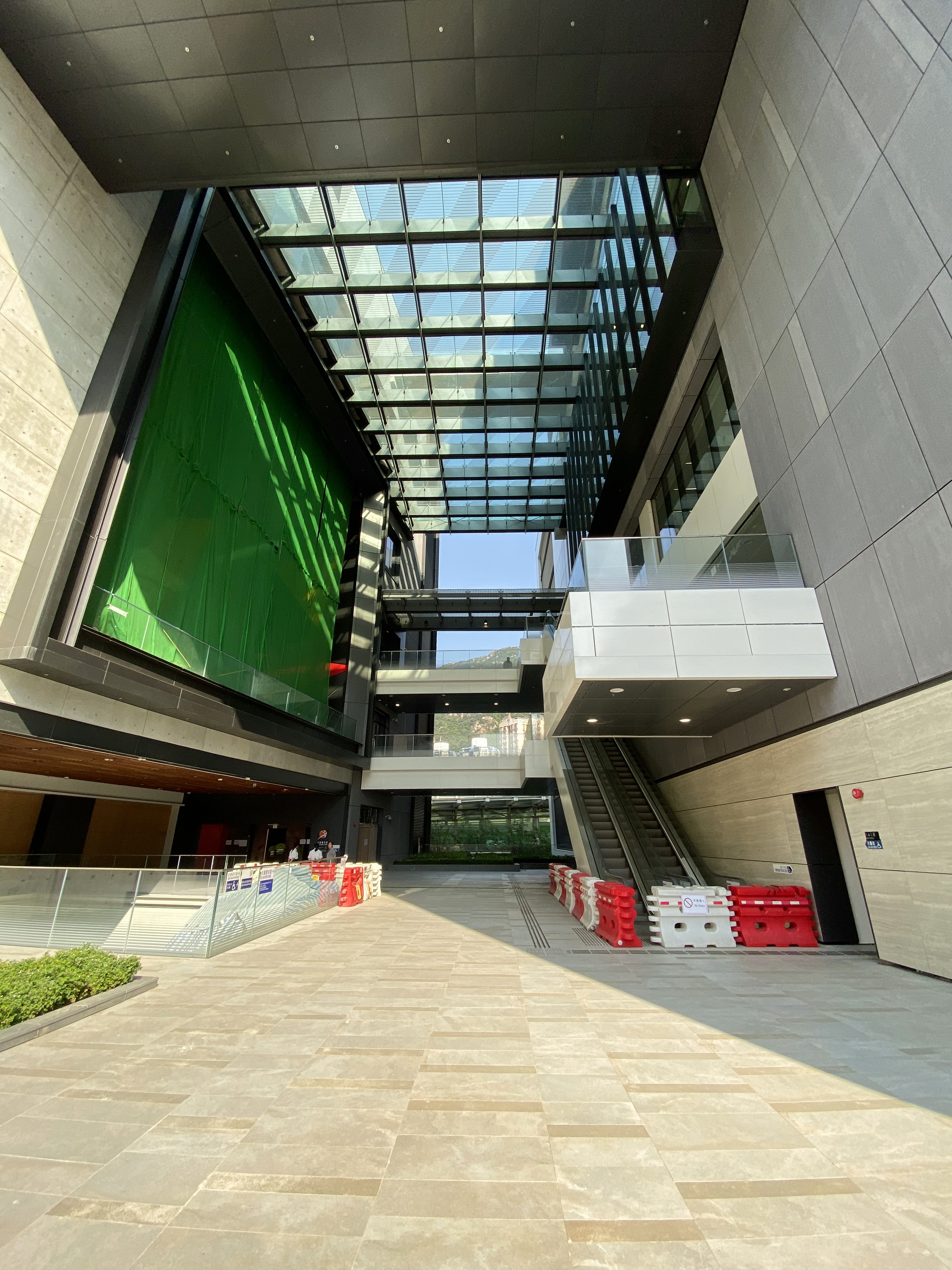 Tuen Mun Siu Lun Government Complex Void